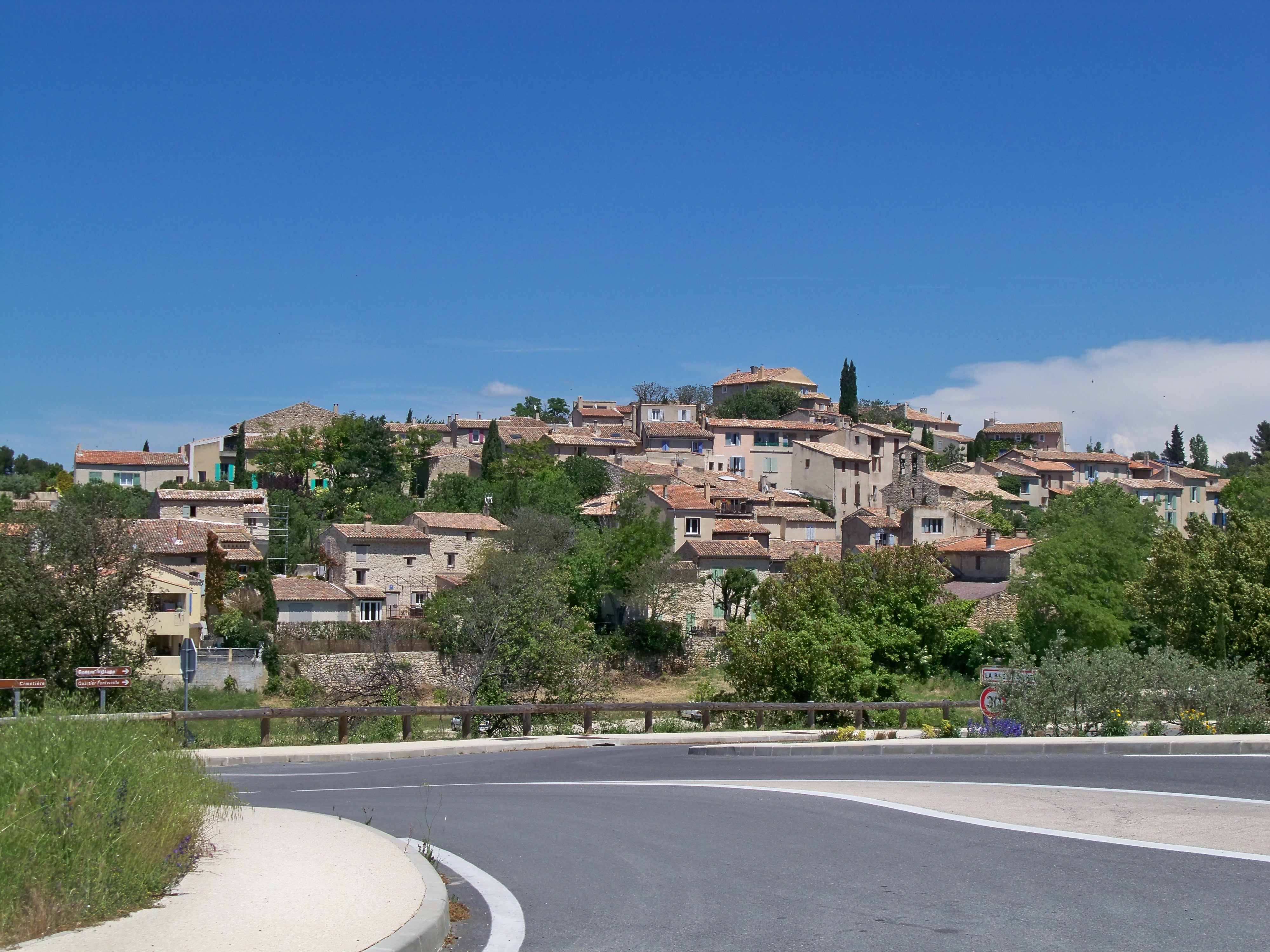 Village de la Bastidonne